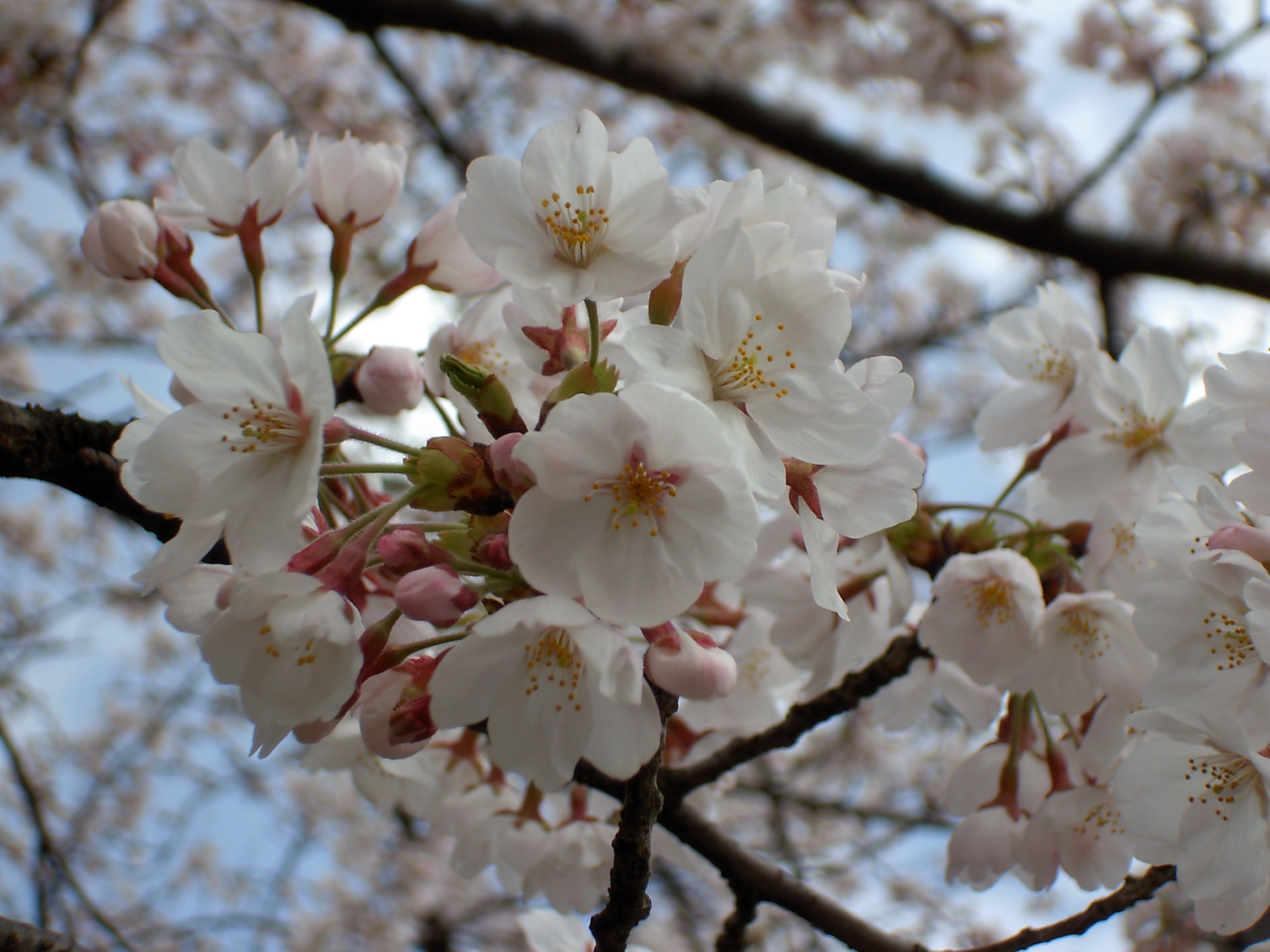 桜。高岡古城公園 (日本、富山県高岡市)にて。 / A cherry (Prunus sp.) in Takaoka Kojō Park (Takaoka-city, Toyama, Japan)